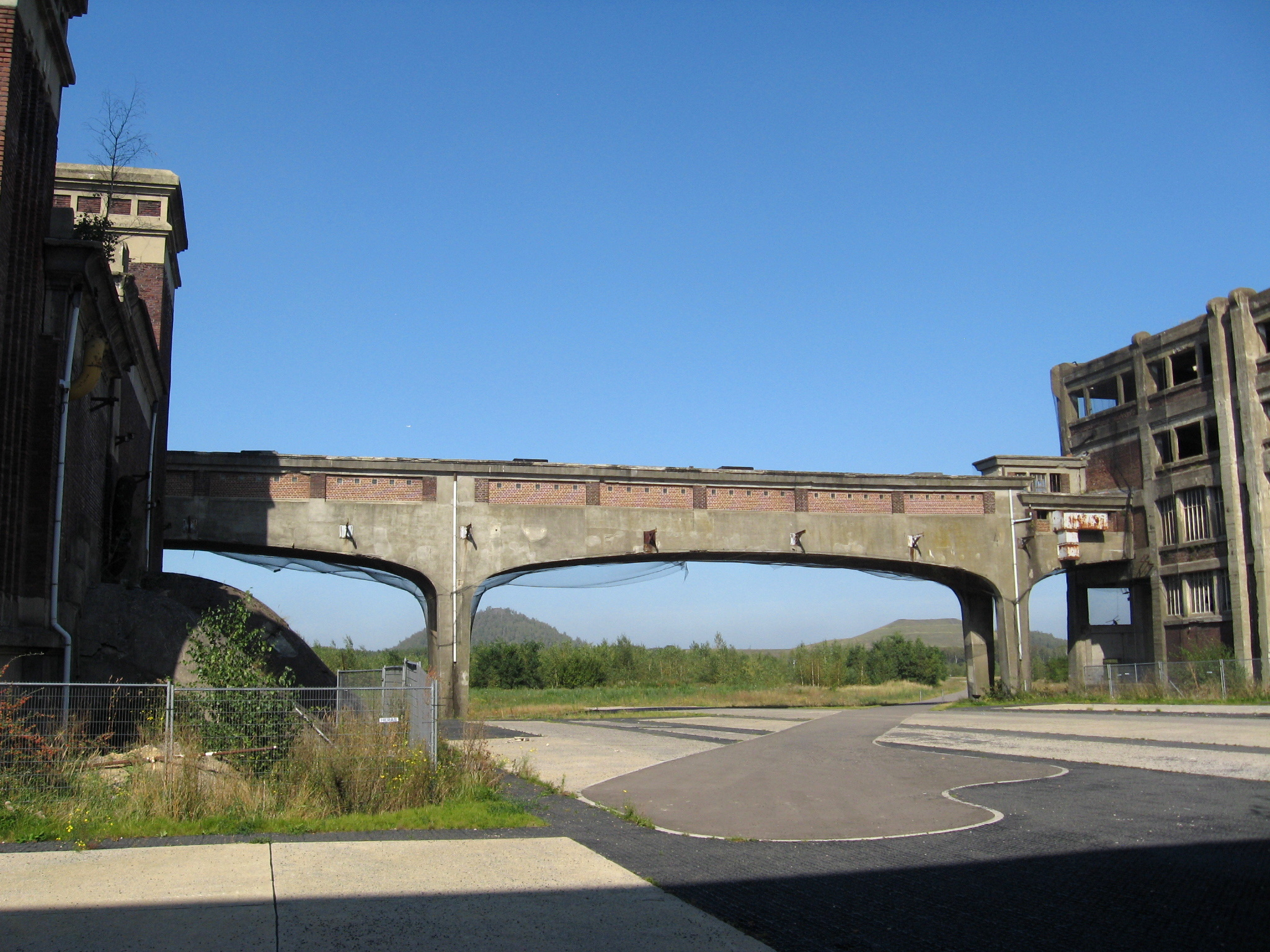 Betonnen voetgangerspasserel op de Steenkoolmijn Waterschei in Genk